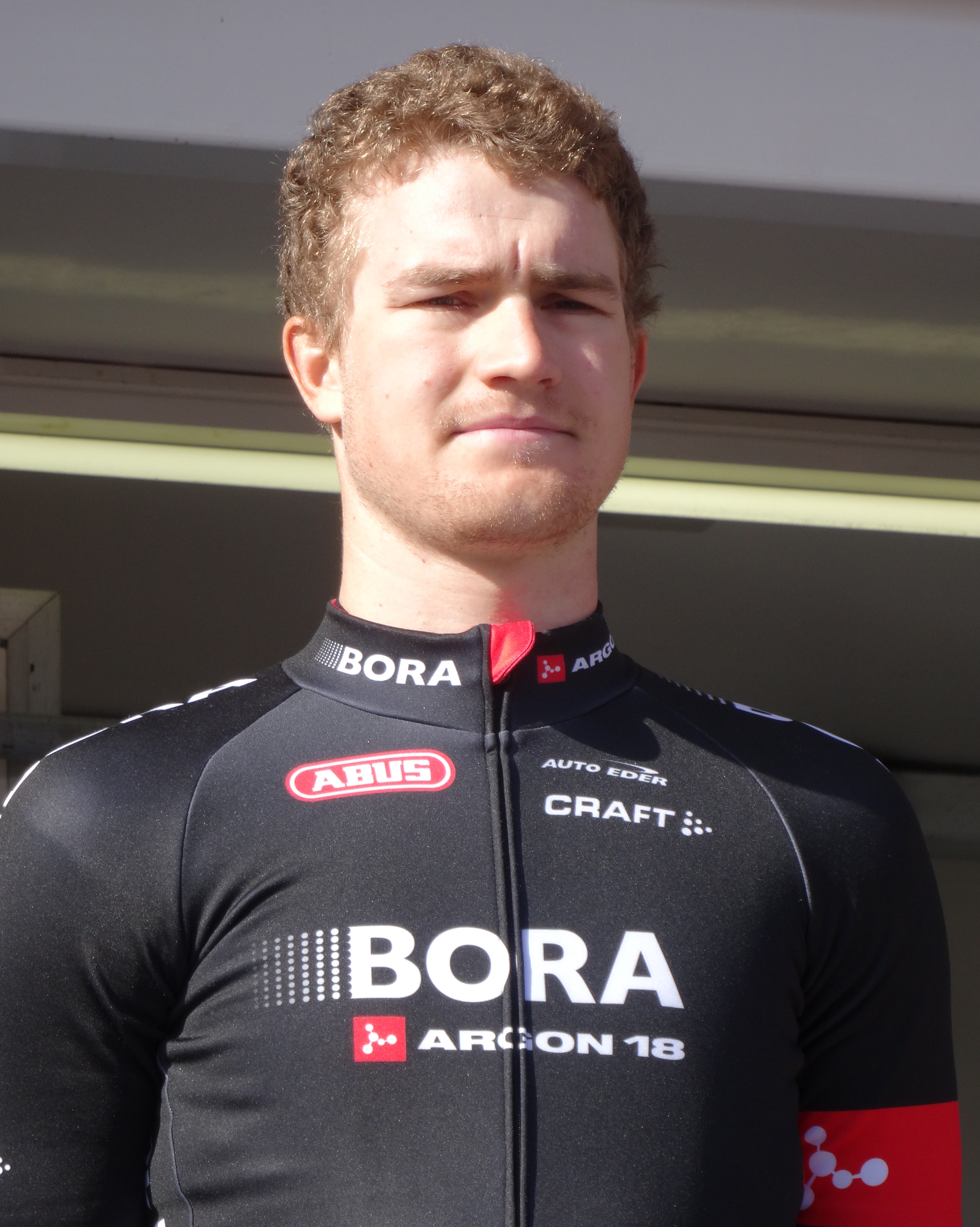 Reportage réalisé le mercredi 4 mars à l'occasion du départ du Samyn des Dames 2015 et du Samyn 2015 à Quaregnon, Belgique.